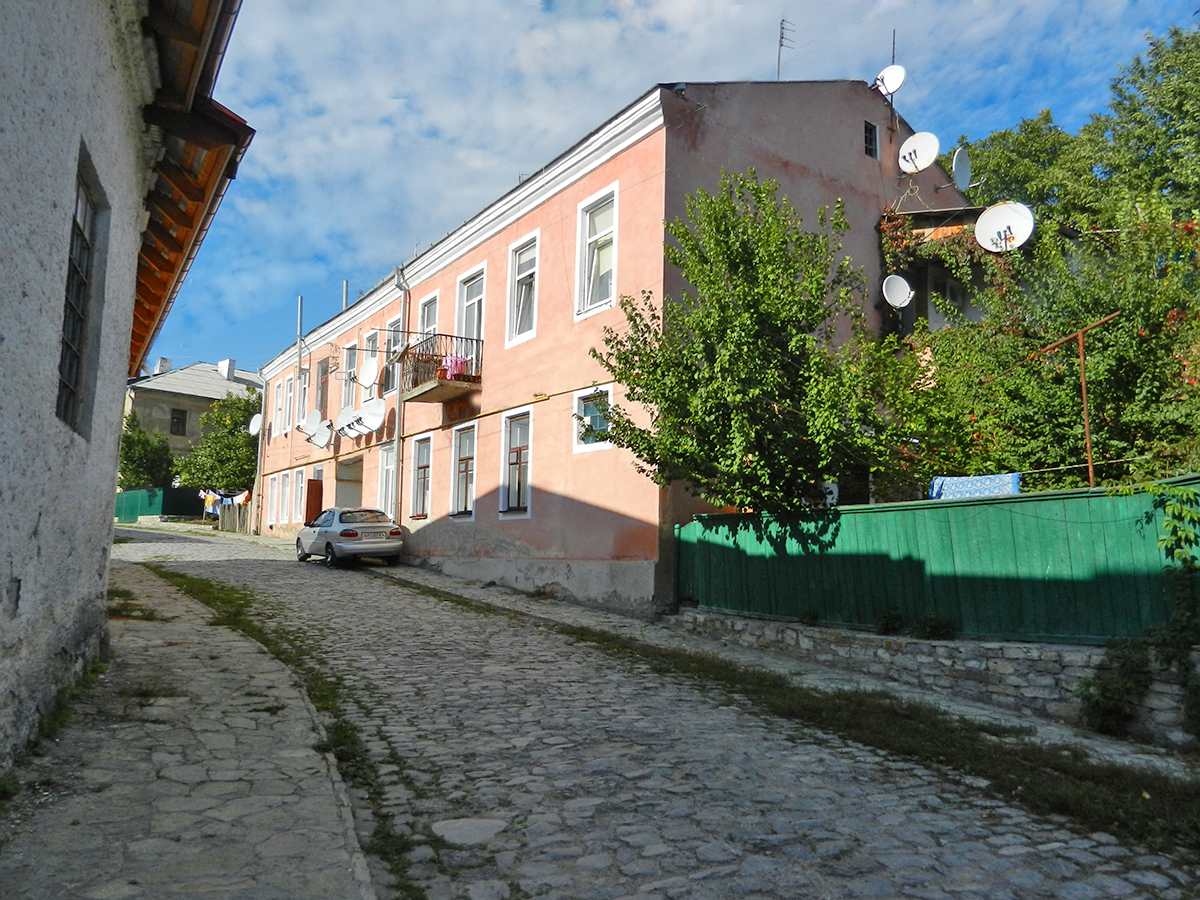 Хмельницька область, м.Кам'янець-Подільський